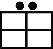 Das taktische Zeichen der Sanitätsgruppe